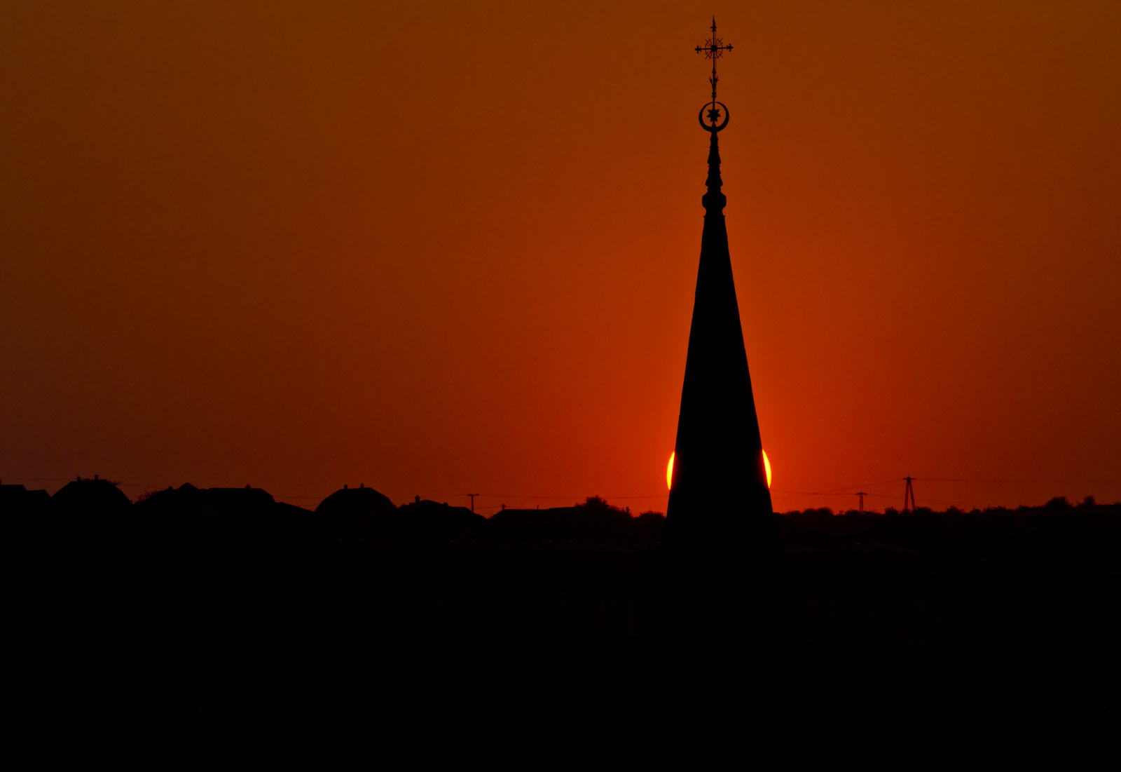 Minaret (Eger, Knézich Károly u.) This is a photo of a monument in Hungary, Identifier: 5528